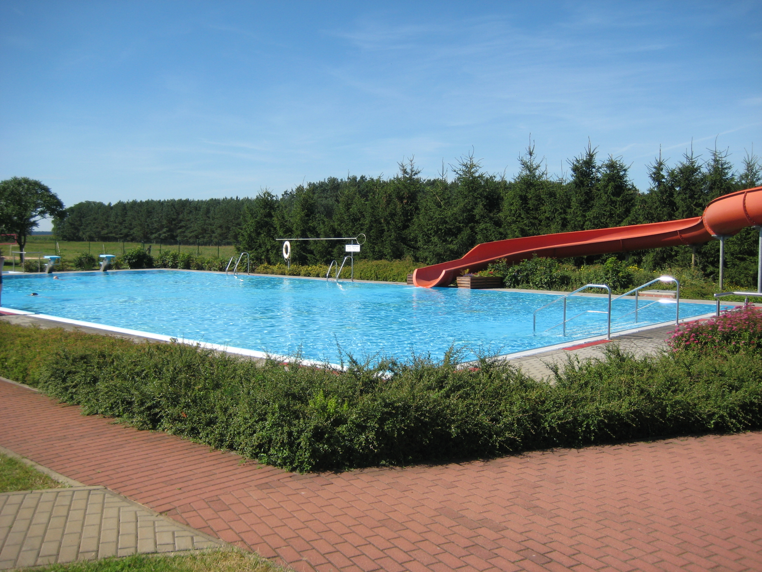 Wahlsdorf - Freibad am Fläming-Skate RK1